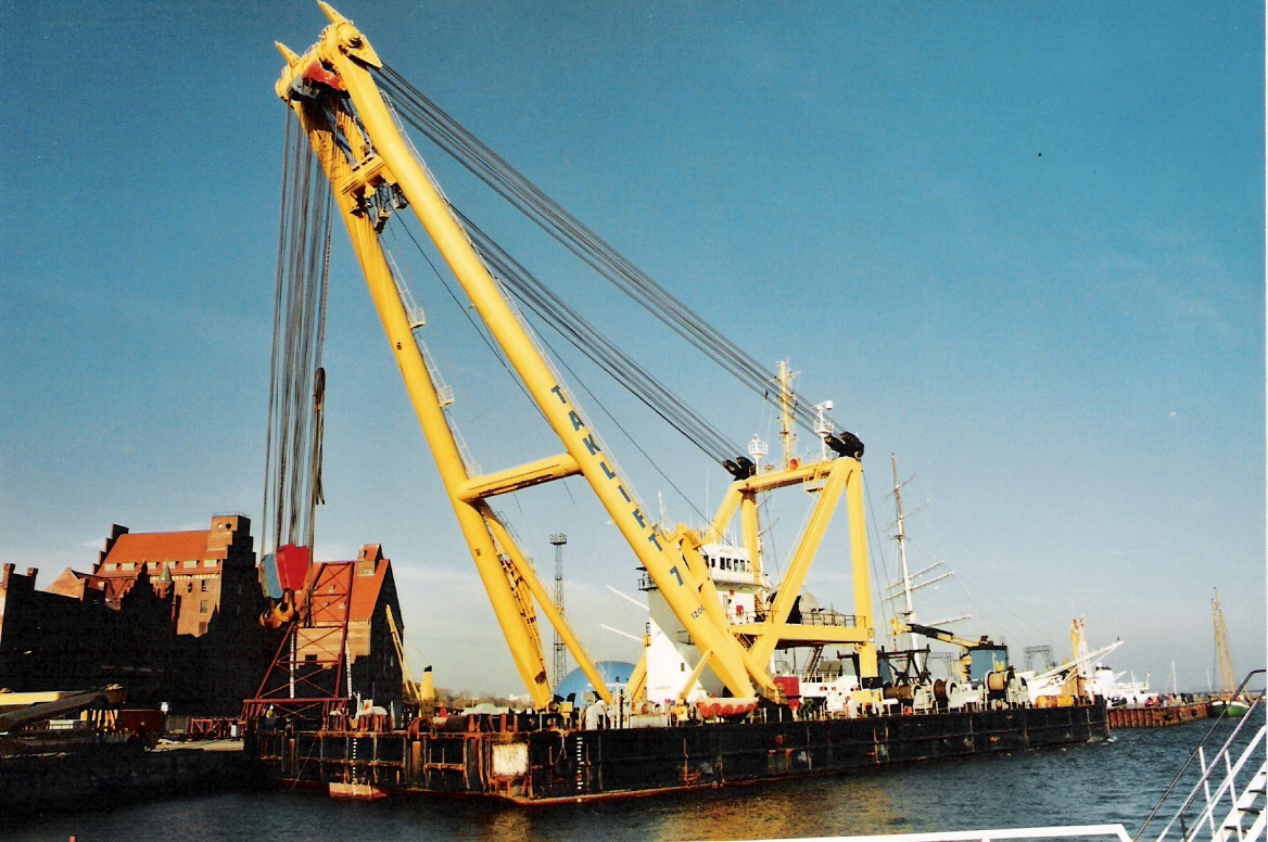 Autor: Benutzer:Klugschnacker, Schwimmkran Taklift 7 aus Rotterdam am Stralsunder Hansakai (2005-10-29).